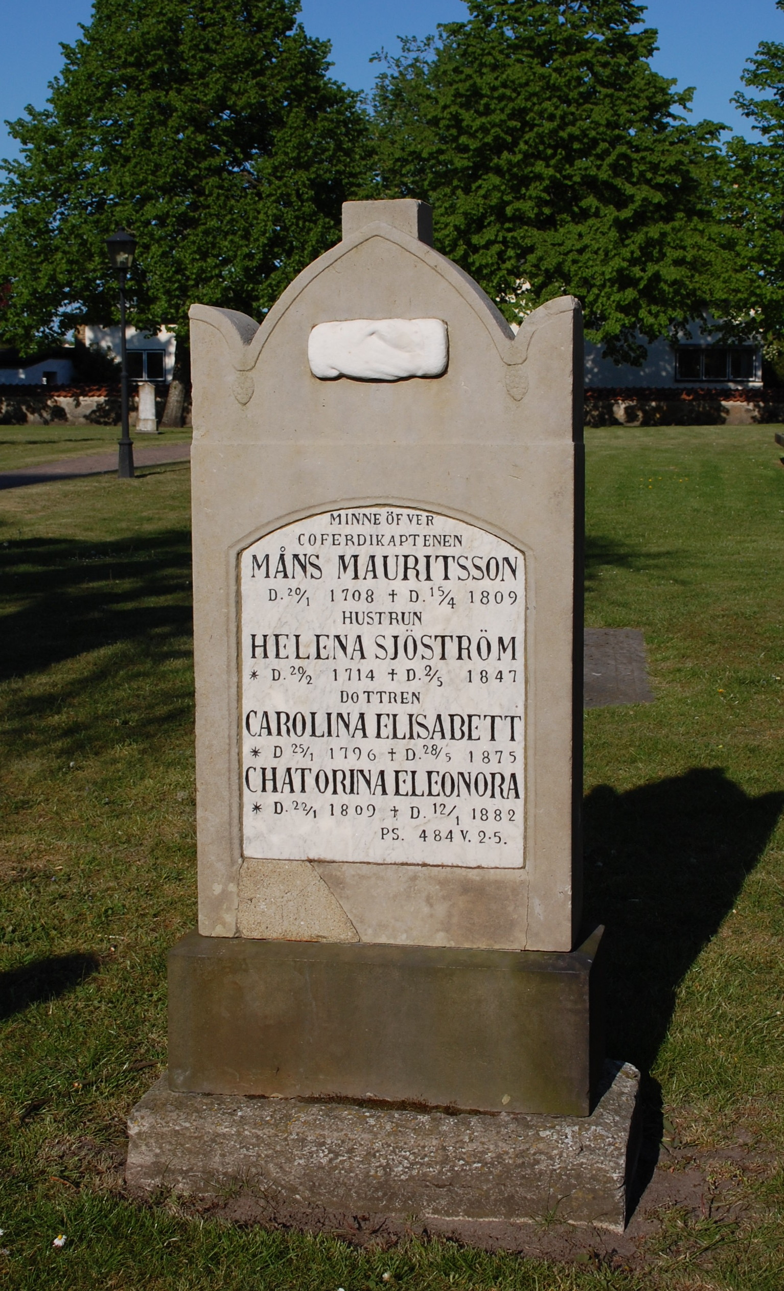 Grabstein auf dem Kirchhof in Ahus